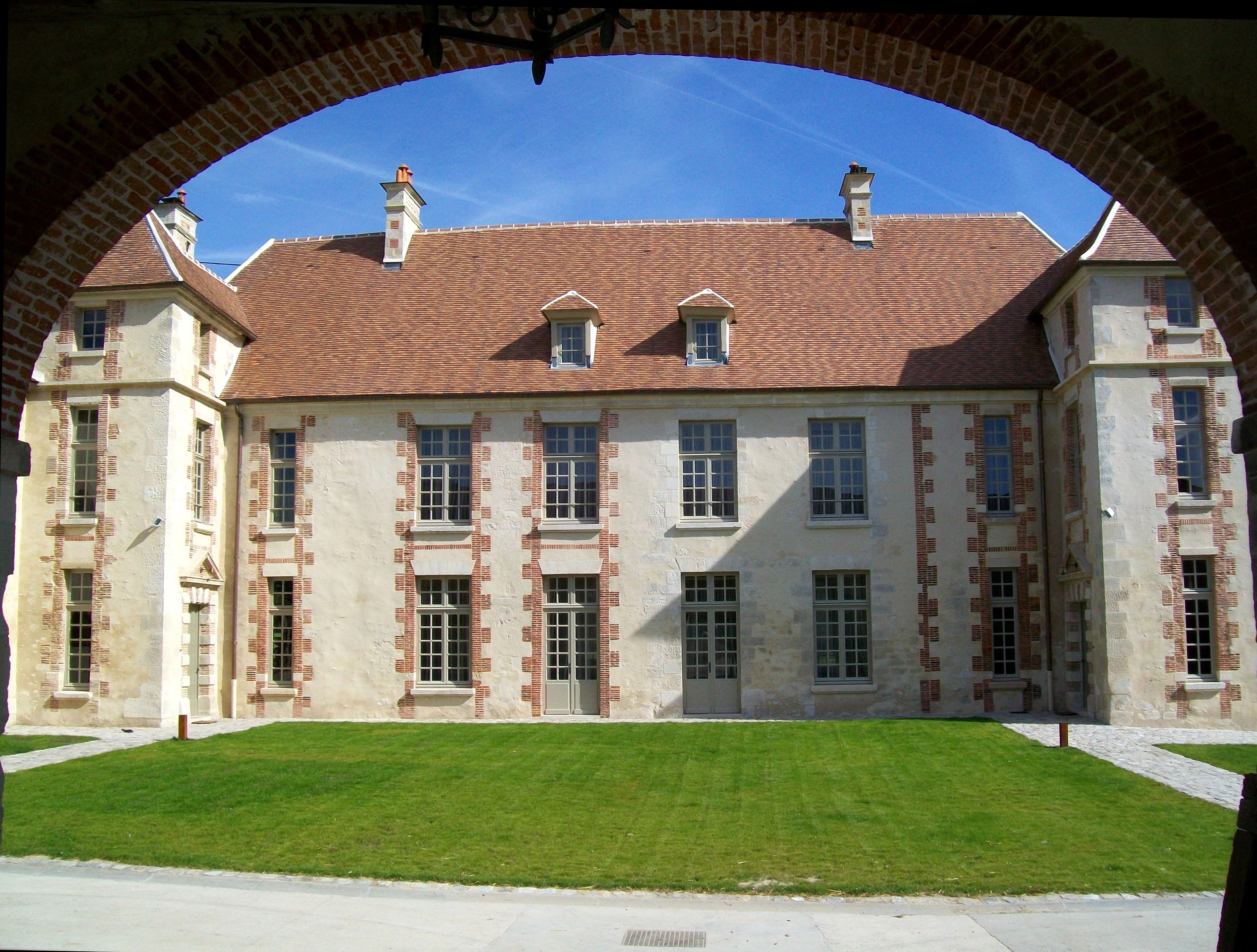 La maison des moines construite à partir de 1552, faisant partie de l'ensemble de bâtiments formant la ferme de l'Abbé, rénovée en 2009.